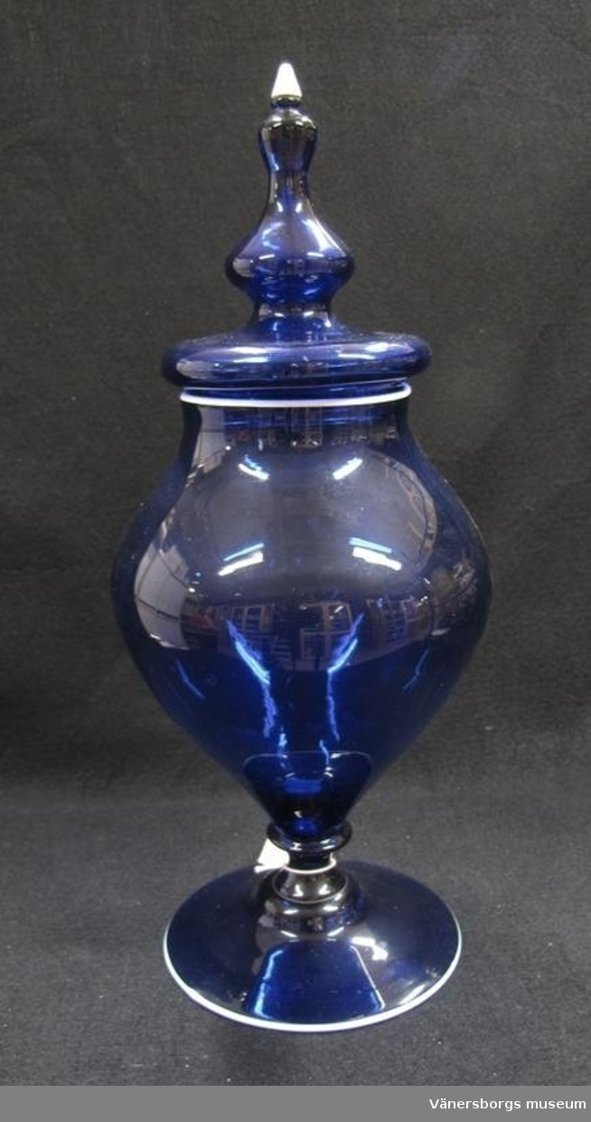 En av ett par lockurnor i blått glas med vit kantdekor vid fot, mynning och lockets topp. Urnorna står på en hög rund fot och har lock med topp formad i fyra avsatser. En av urnorna saknar lock sedan lång tid. Urna av denna modell finns avbildad i Illustrerat Antiklexikon av B. Tunander, Värnamo 1986 sidan 144. Urnorna är inköpta av givarens mormorsfar, troligen på Västkusten. Han flyttade till Trollhättan 1847 och köpte troligen in dem vid Denna tid. Själv sade han att han aldrig skulle sälja dem och hoppades att de aldrig skulle säljas för pengar.